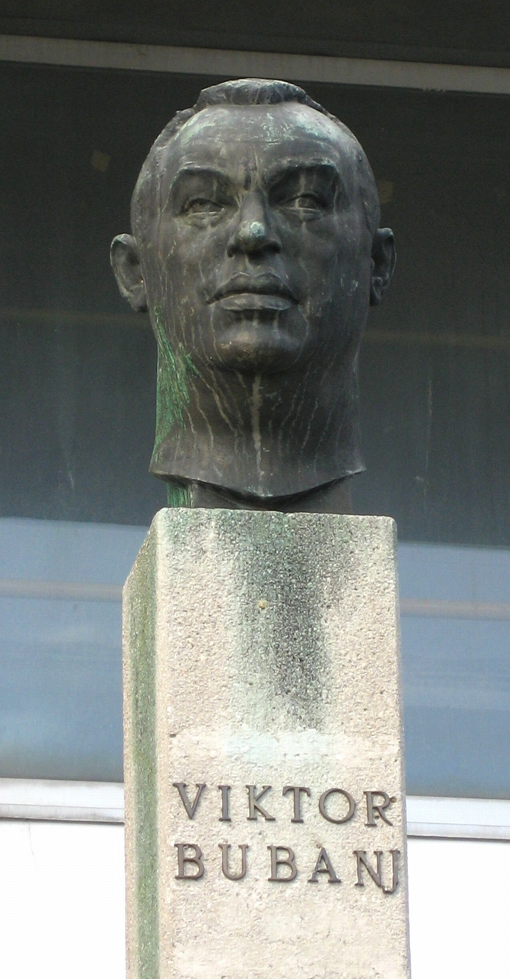 Spomenik Viktoru Bubnju na Trsatu u Rijeci.